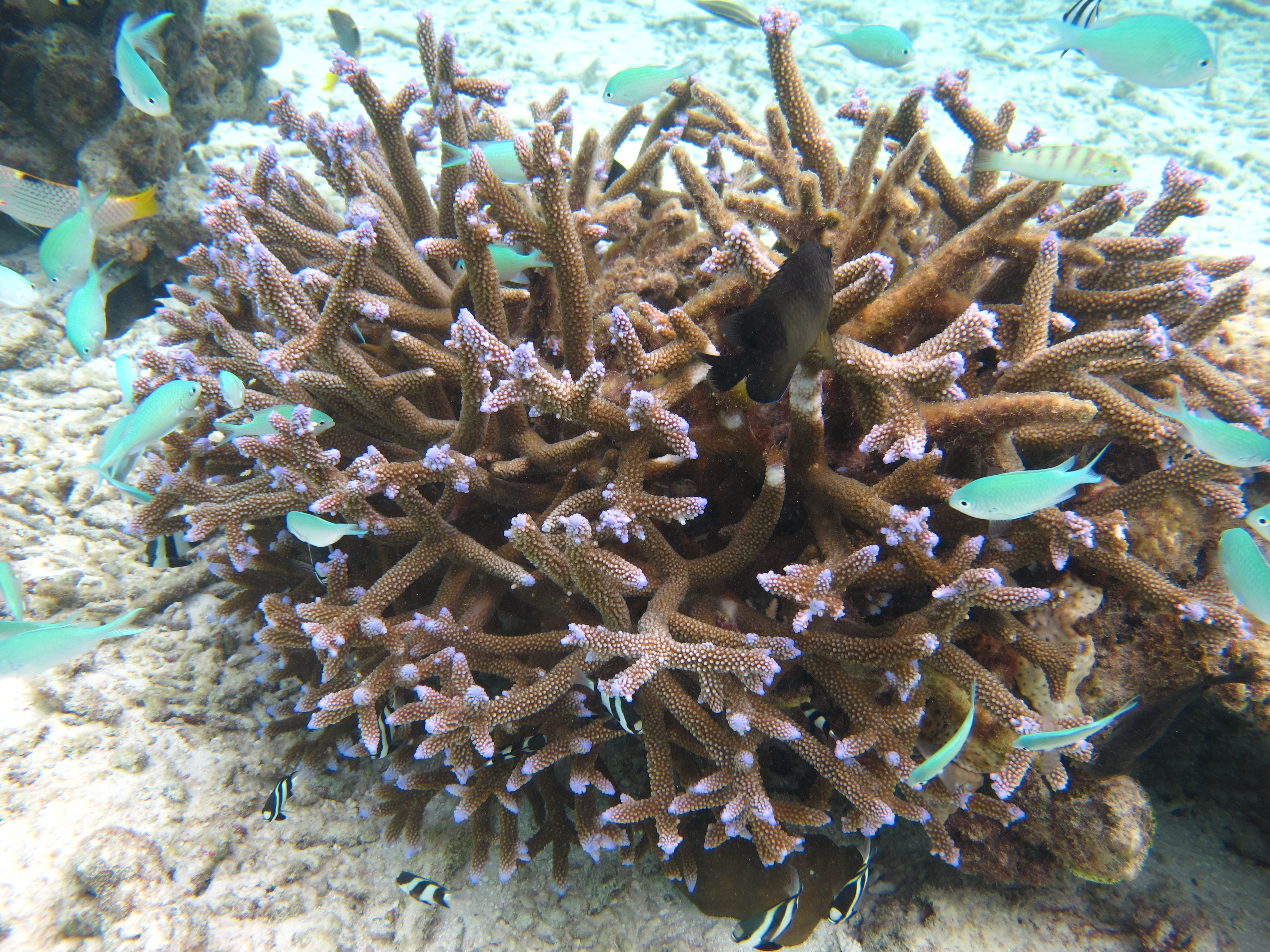 Une colonie de corail Acropora muricata aux Maldives (atoll de Baa).